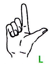 Buchstabe L im deutschen Fingeralphabet, gemäß einer Infokarte des Landesverbandes Bayern der Gehörlosen e.V. (